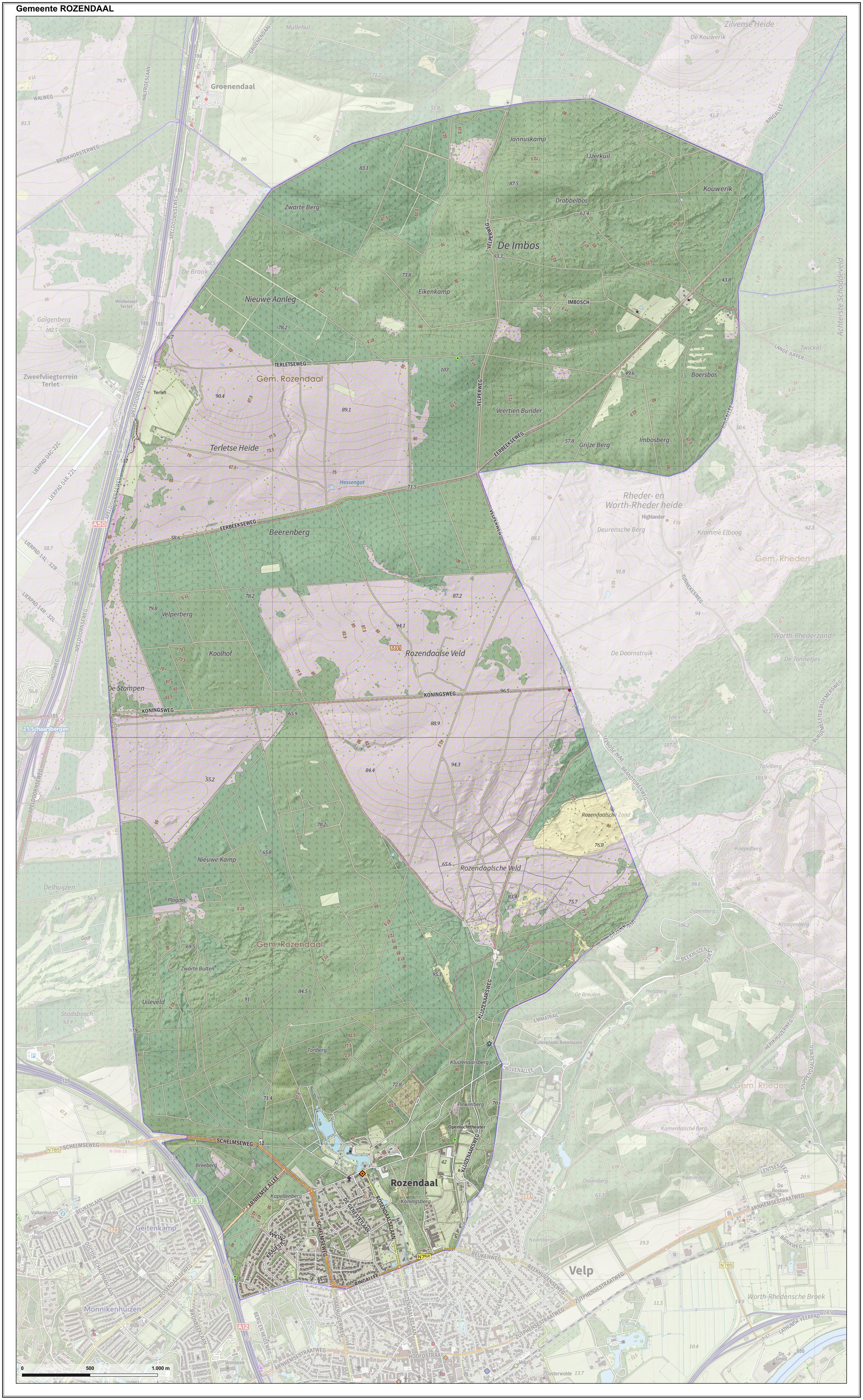 Topografische gemeentekaart. Resolutie: 400 pixels/km. Kaartbeeld samengesteld uit de open geodata van de Top10NL en Top25namen (Kadaster), Creative Commons-BY licentie. Gebouwvlakken uit open geodata BAG extract. Wegen uit de OpenStreetMap, OpenStreetMap community. Reliëfschaduw uit de Actuele Hoogtekaart AHN2. Samenstelling en kleurenschema: Jan-Willem van Aalst, met QGIS. Zie ook de Legenda.